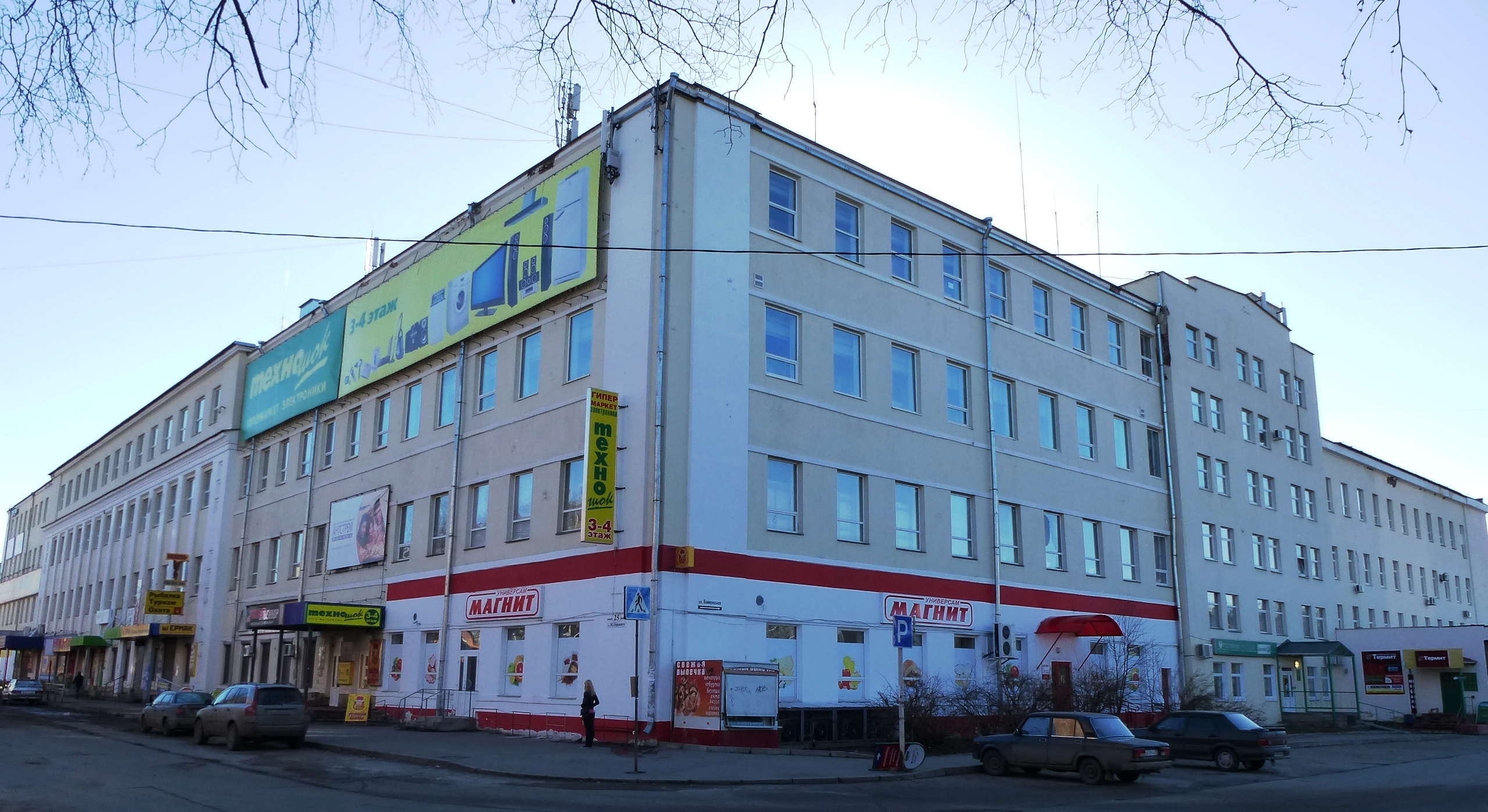 Квартал зданий бывшей Слюдяной фабрики им.8 Марта в Петрозаводске на углу ул.Коммунальной и ул.Горького